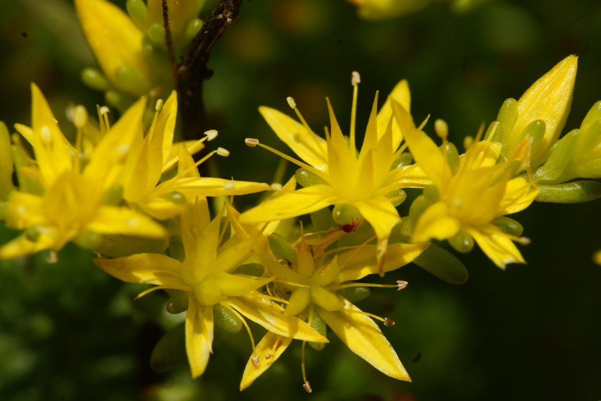 Šesterokotna homulica na Rakitni.